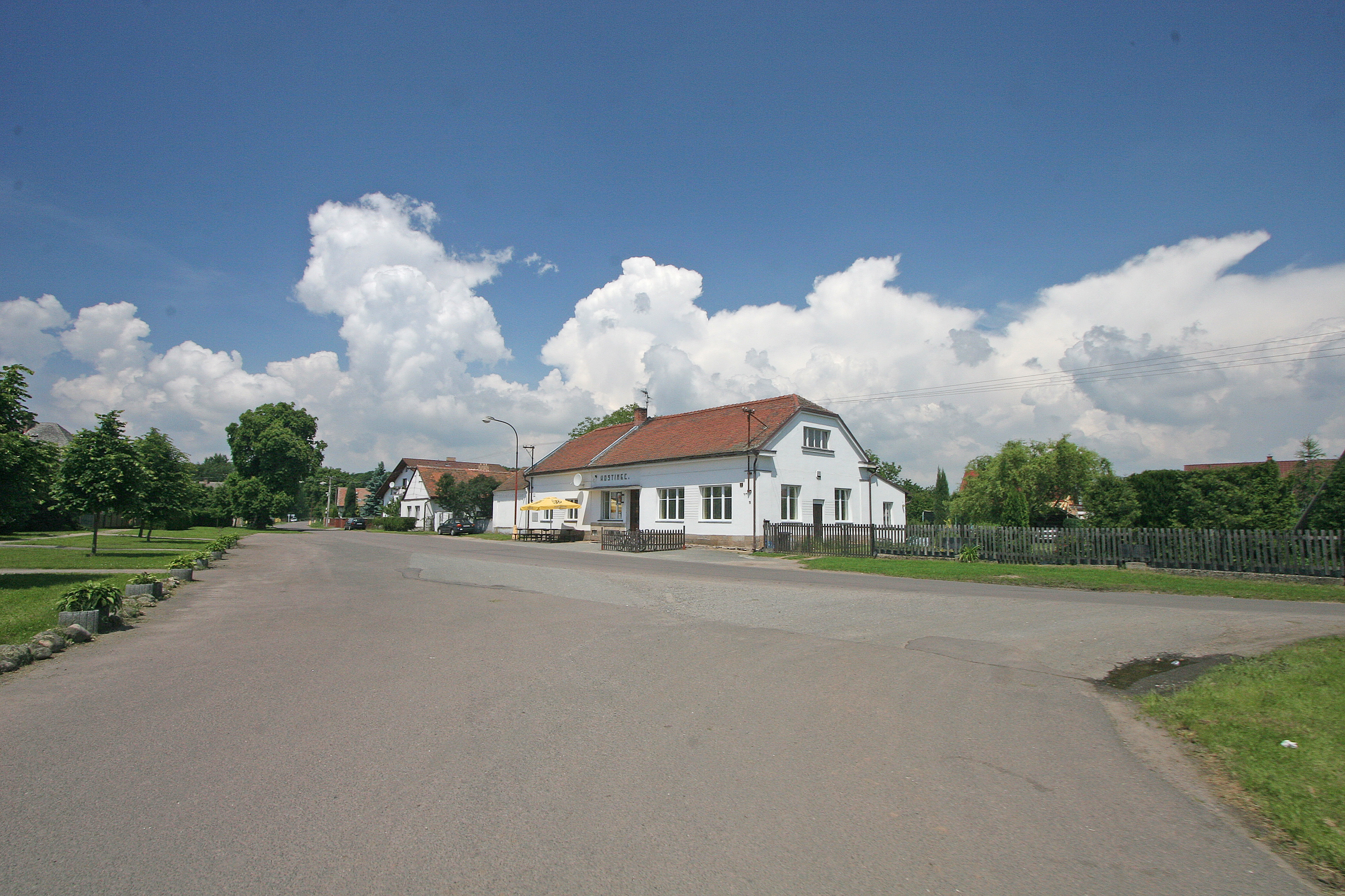 Pohřebačka hostinec